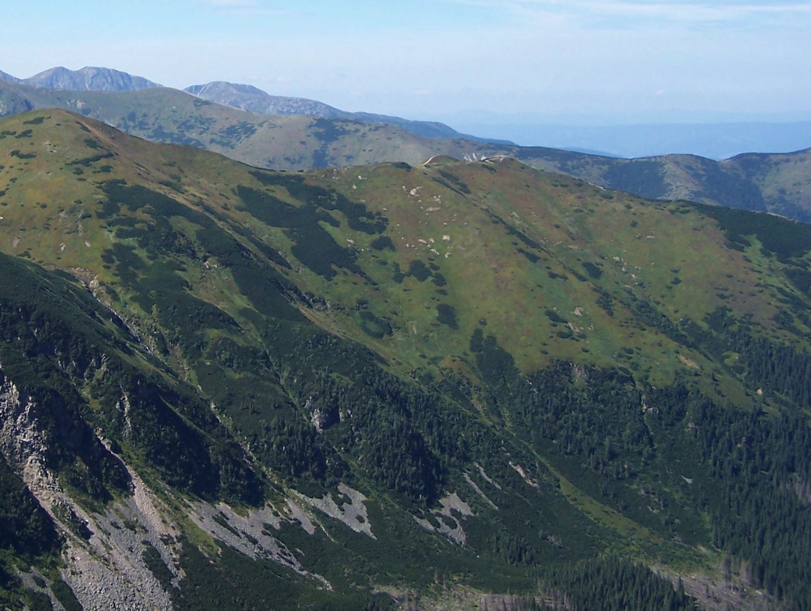 Widok z Ornaku. Na pierwszym planie Czubik, Przełęcz nad Gęsią Szyją, Trzydniowiański Wierch i jego grzbiet Kulawiec. W dole Dolina Starorobociańska. Powyżej północna grań Wołowca, u samej góry Salatyny